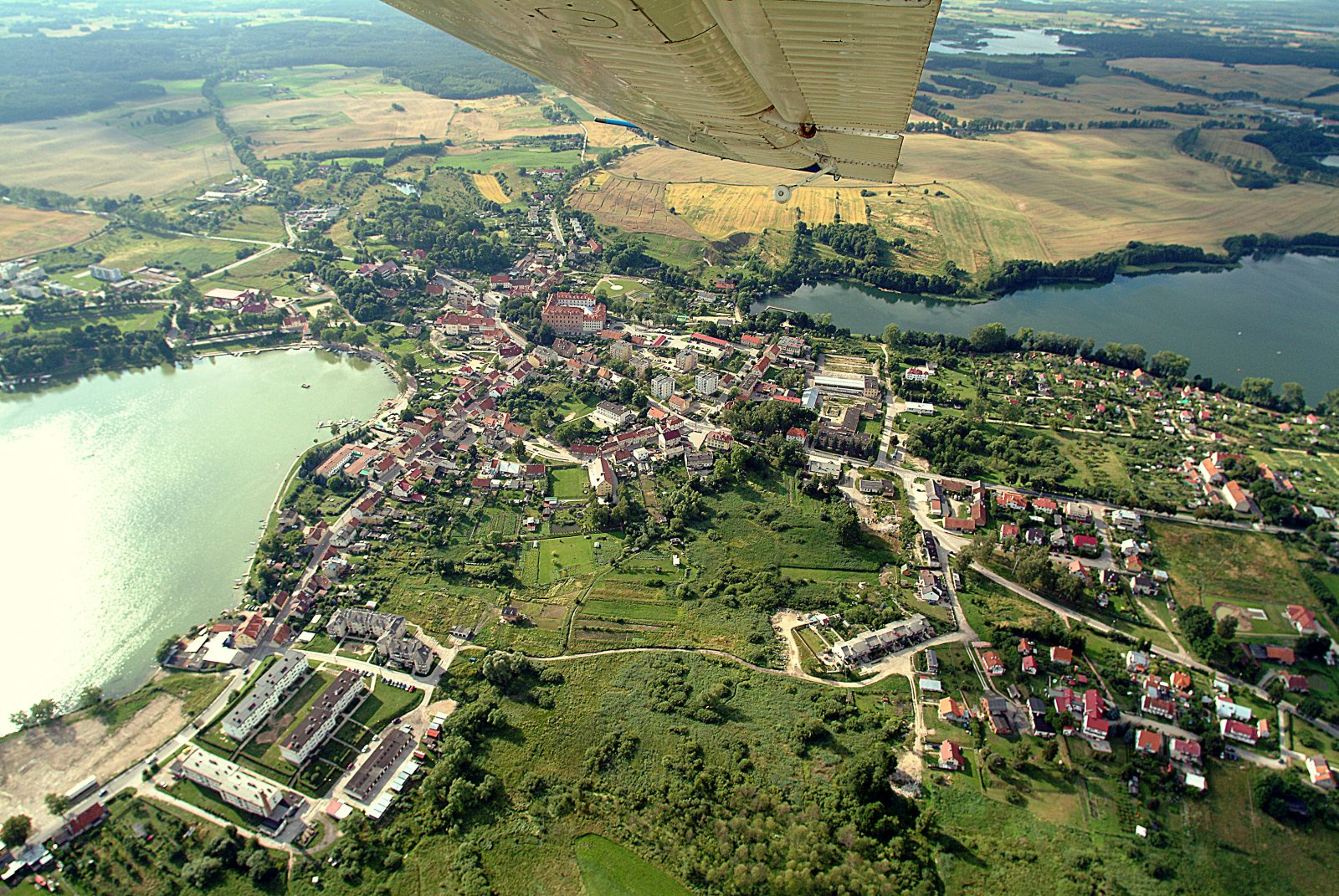 Zdjęcie z lotu ptaka ukazujące Ryn "wciśnięty" pomiędzy jeziora Ołów oraz Ryńskie. W centrum widoczny Zamek w Rynie.